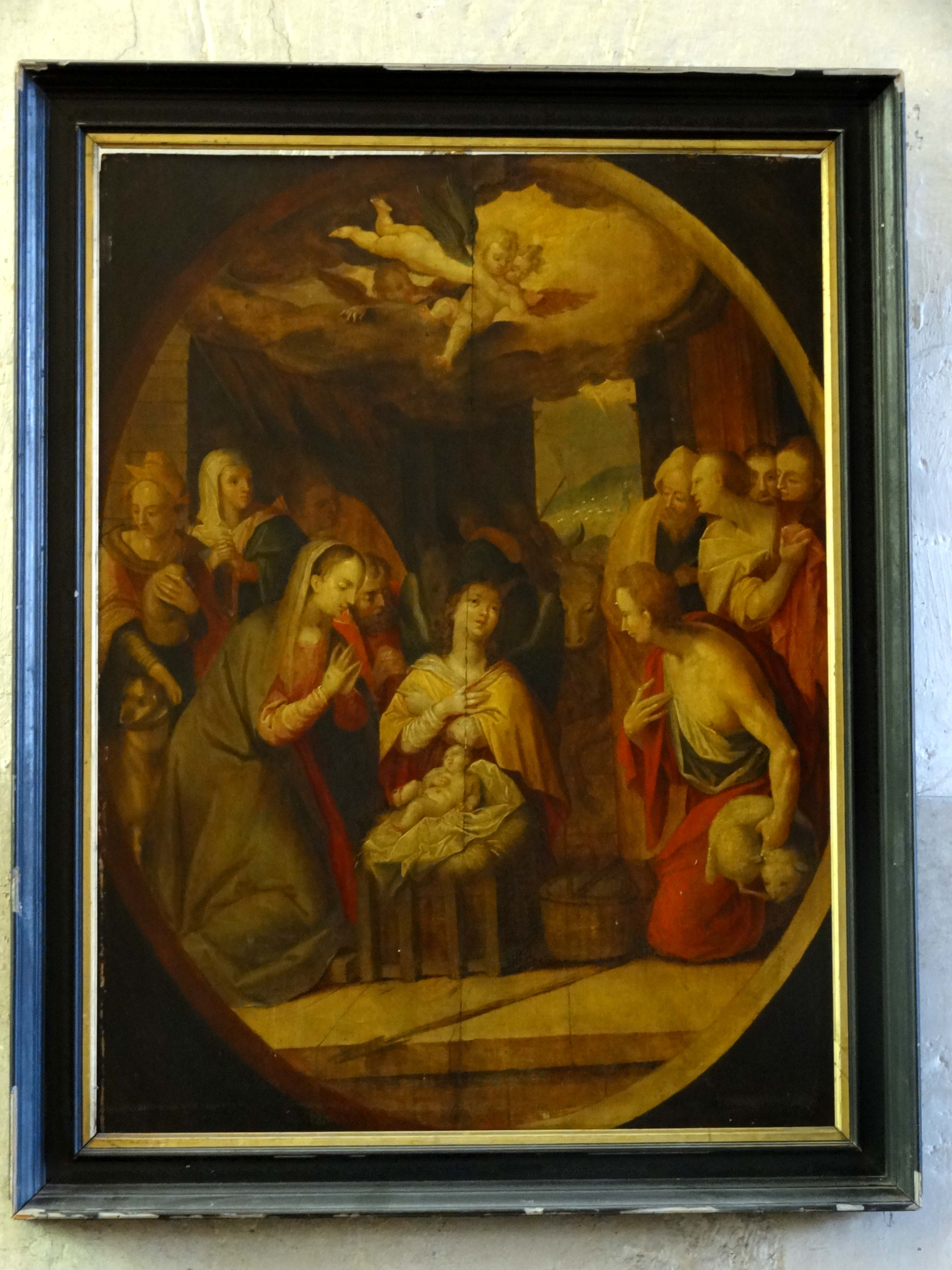 Tableau - L'Adoration des bergers, huile sur bois, 2e moitié du XVIe siècle.